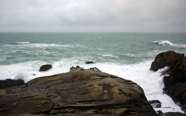 Rochers de St Guénolé avec la croix à l'endroit du drame.